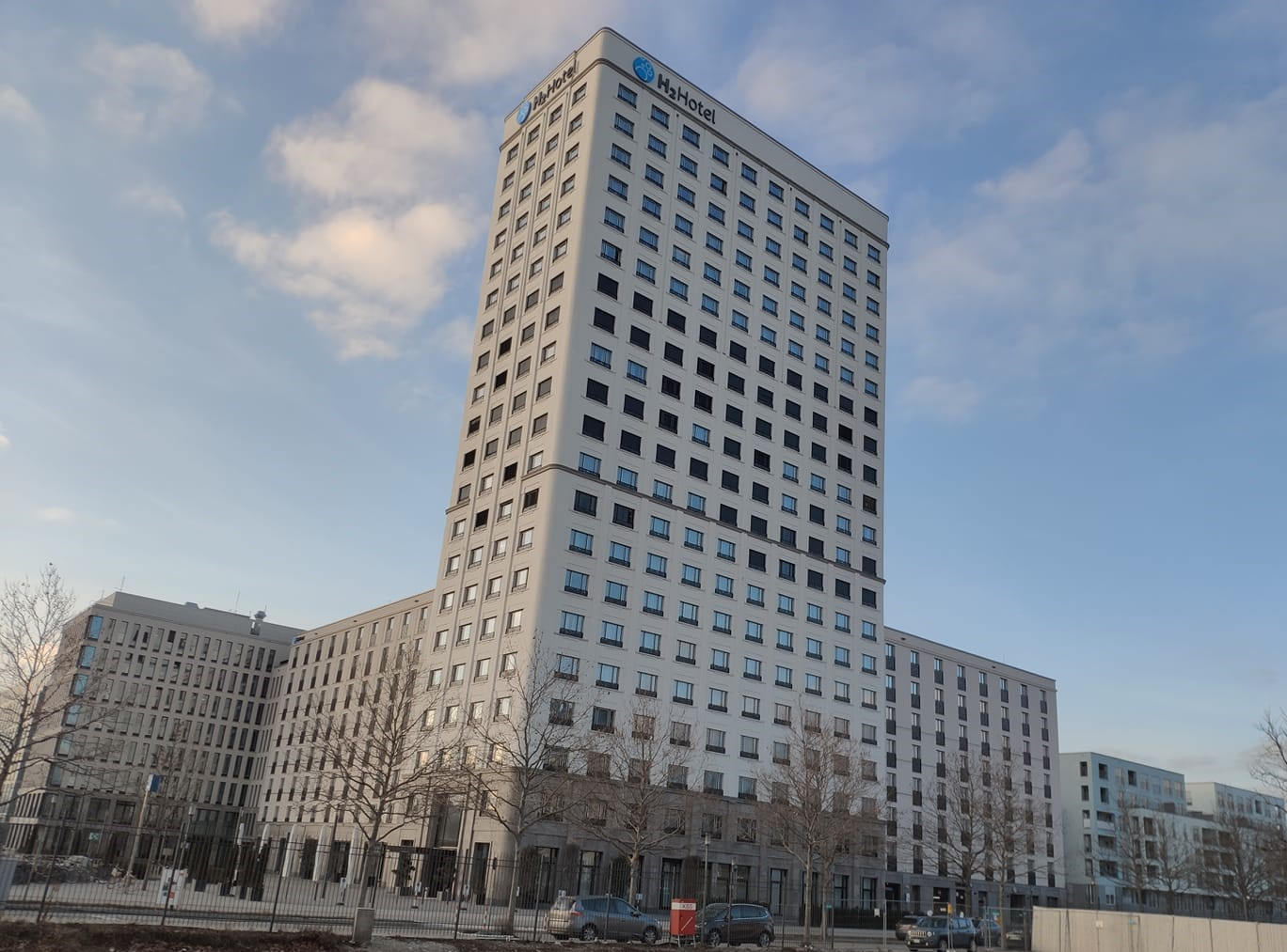 Mo82Munich